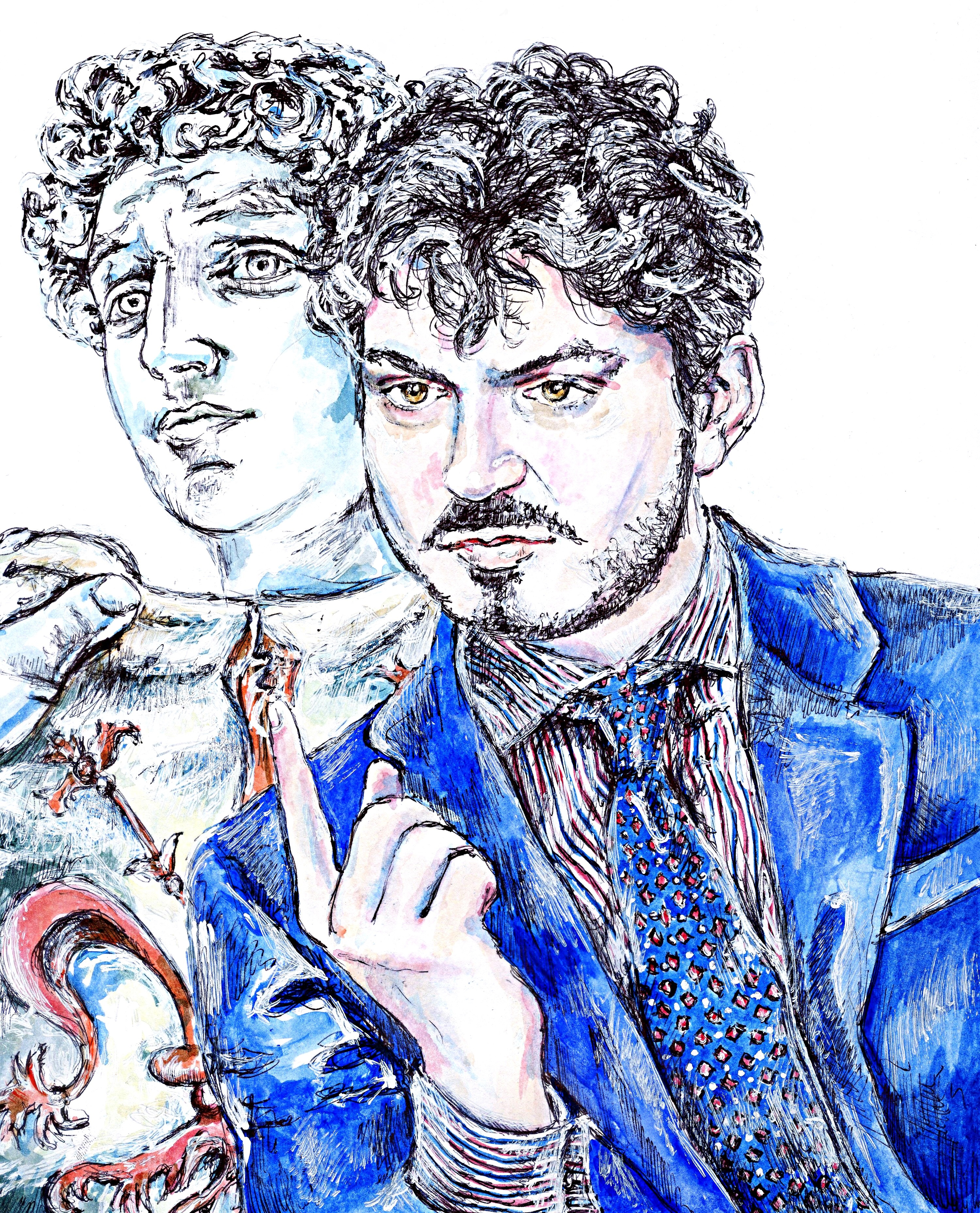 Tommaso Sacchi, assessore alla Cultura, alla Moda e al Design del Comune di Firenze, Presidente della Fondazione Teatro della Toscana / Teatro della Pergola, Presidente del Museo Stibbert; illustrazione dell'artista Giovanni Guida, grattage su graphia, 2020. Tommaso Sacchi, Deputy-Mayor for Culture, Fashion and Design of the City of Florence. Chairman of Fondazione Teatro della Toscana / Teatro della Pergola. Chairman of Museo Stibbert. Illustration of Giovanni Guida, 2020.